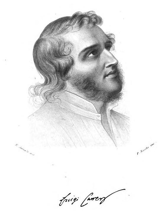 Luigi Carrer (1801 – 1850), scrittore, poeta ed editore veneziano.